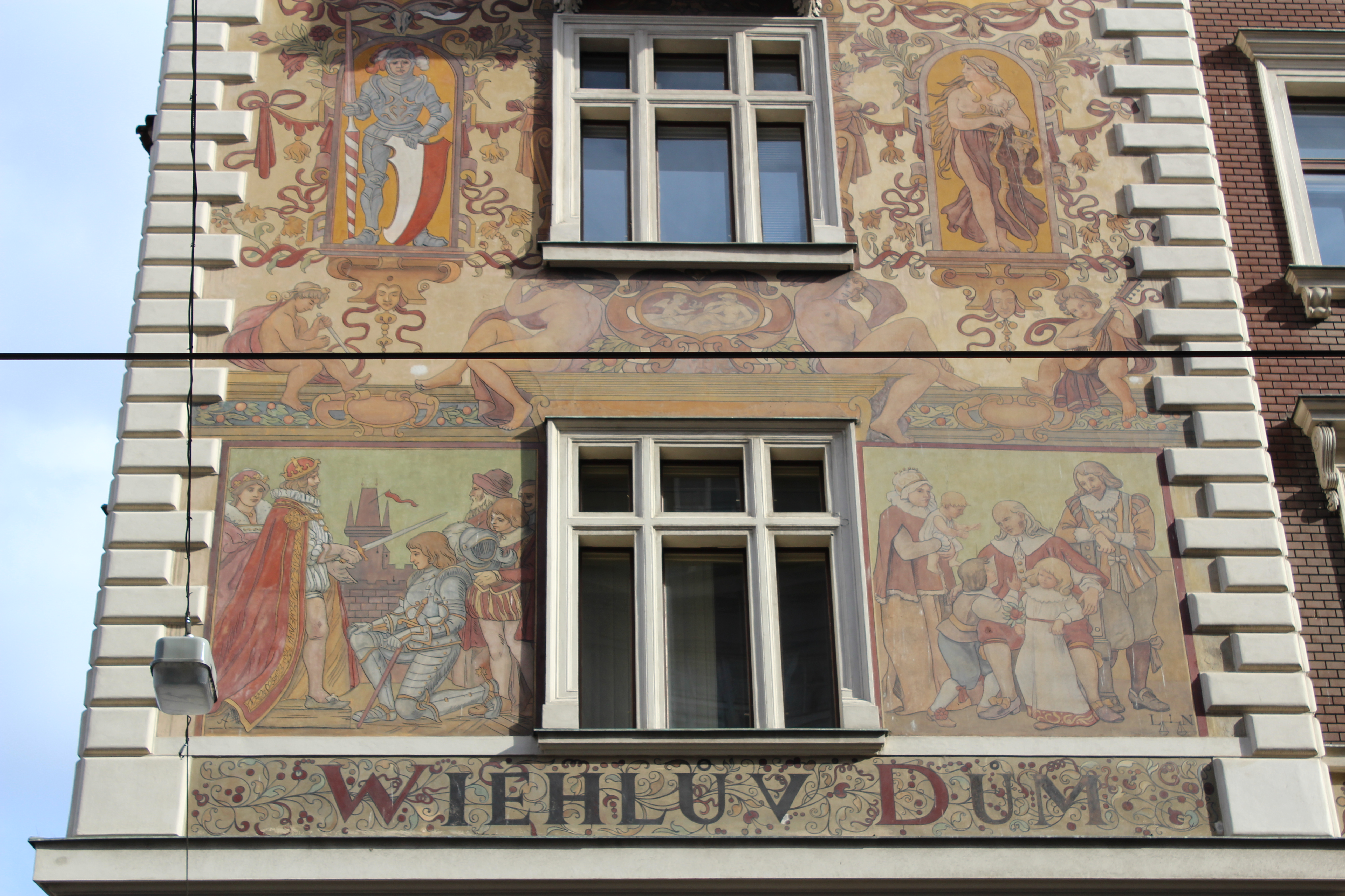 Antonín Wiehl: Wiehlův dům detail z Vodičkovy ulice